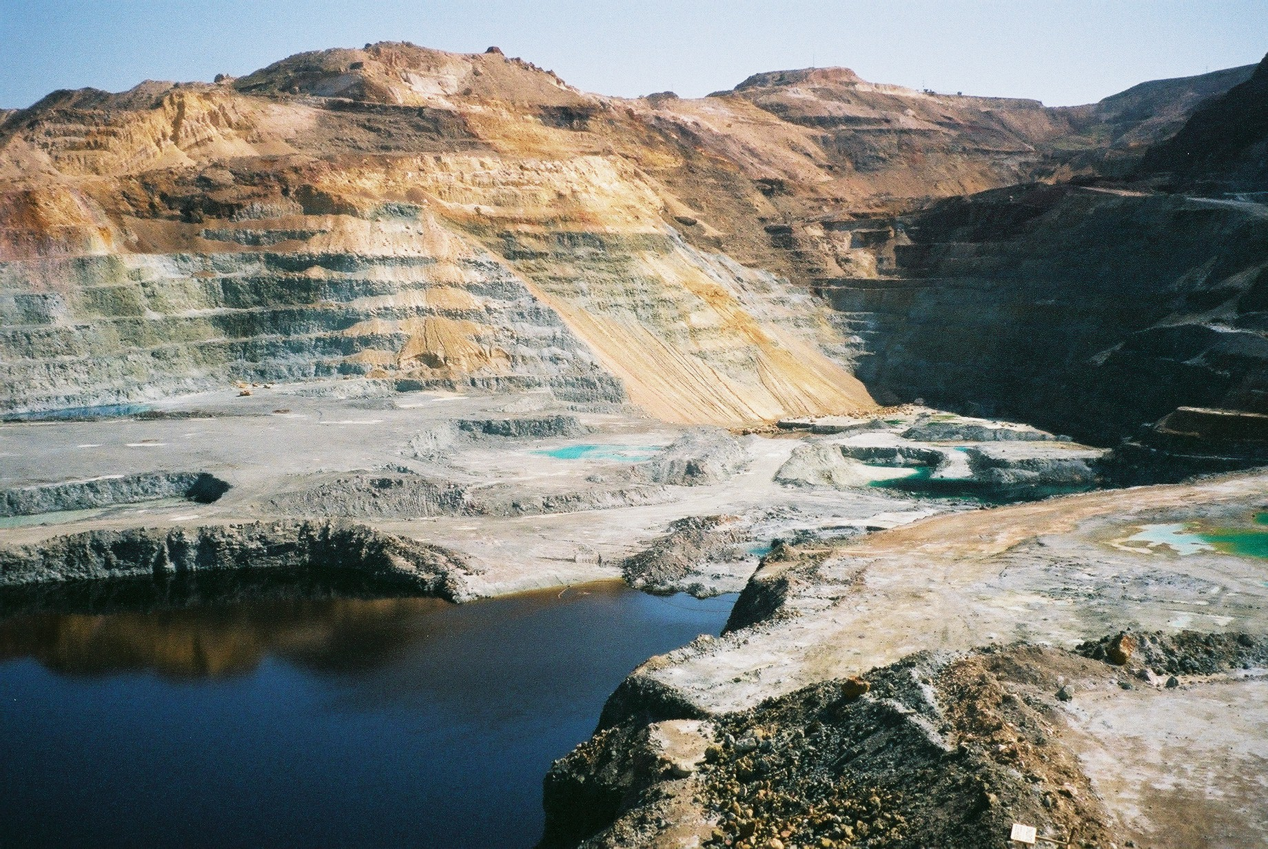 Skiriotissa Mine - open pit mining. A copper mine on Cyprus.